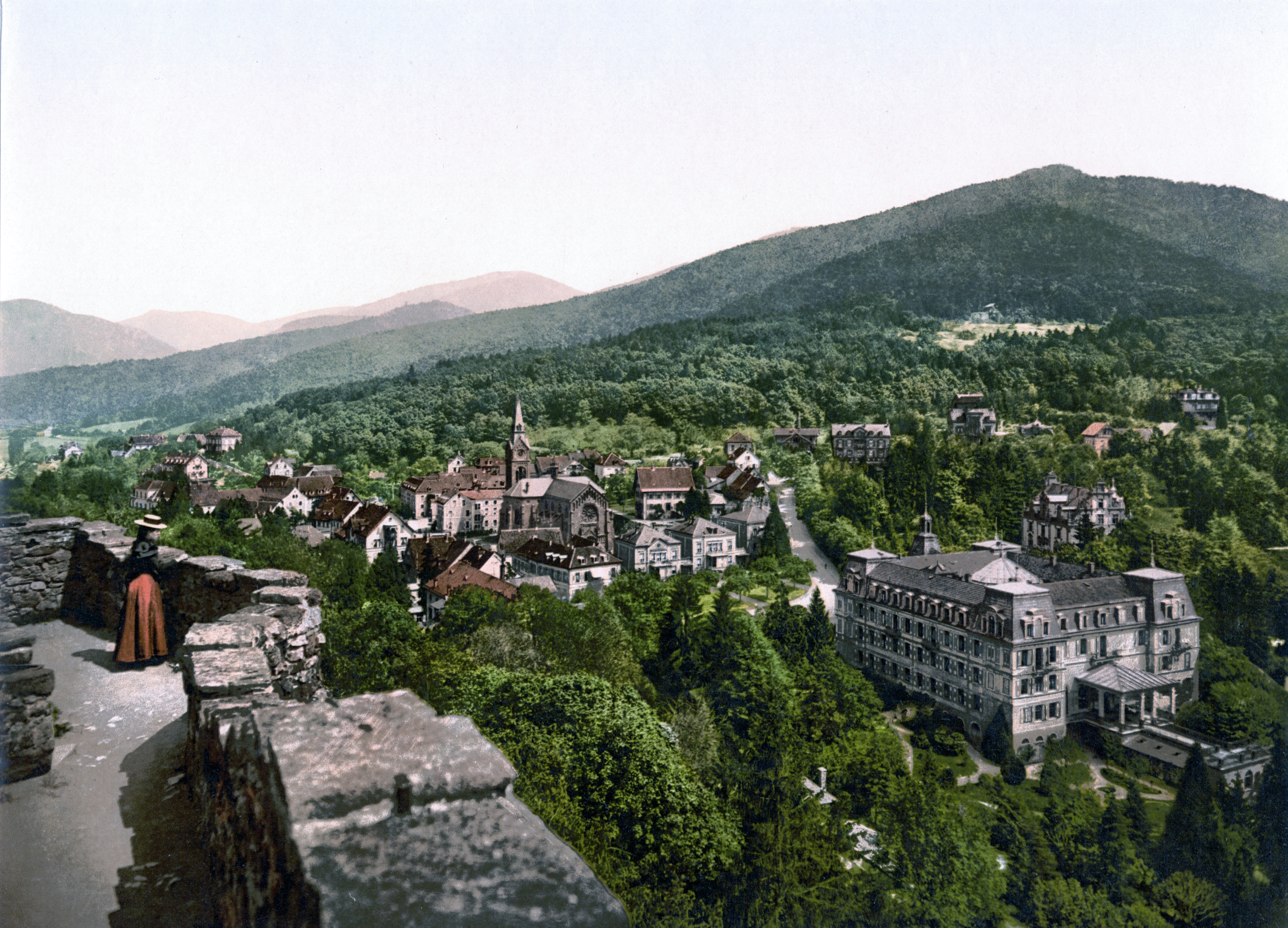 Badenweiler um 1900